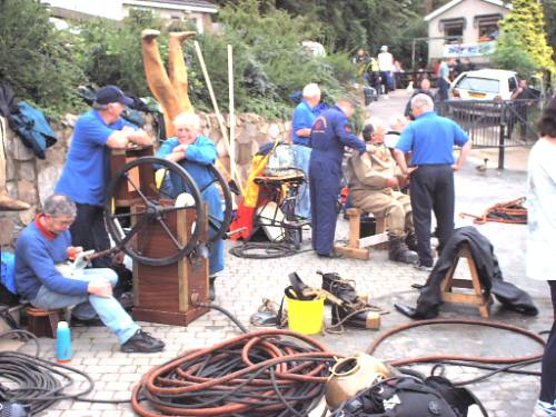 standard diving dress